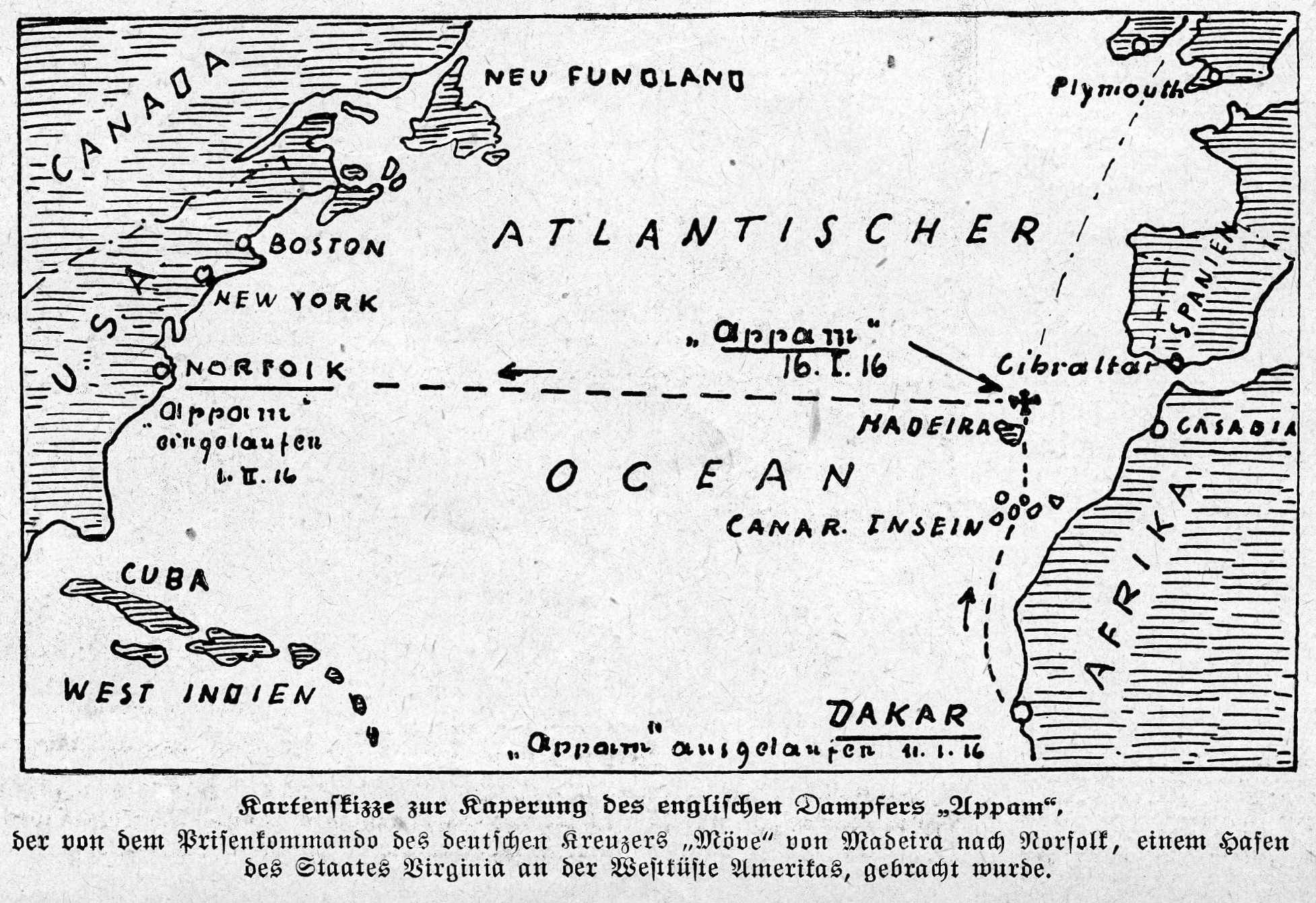 Kartenskizze mit Fahrtroute der Prise APPAM von SMS MÖVE im Januar-Februar 1916 von Madeira nach Norfolk in Virginia. Illustrirte Zeitung 1916